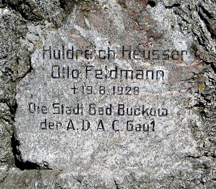 Detailaufnahme des Gedenksteins für Huldreich Heusser und Otto Feldmann an der L35 bei Bollersdorf